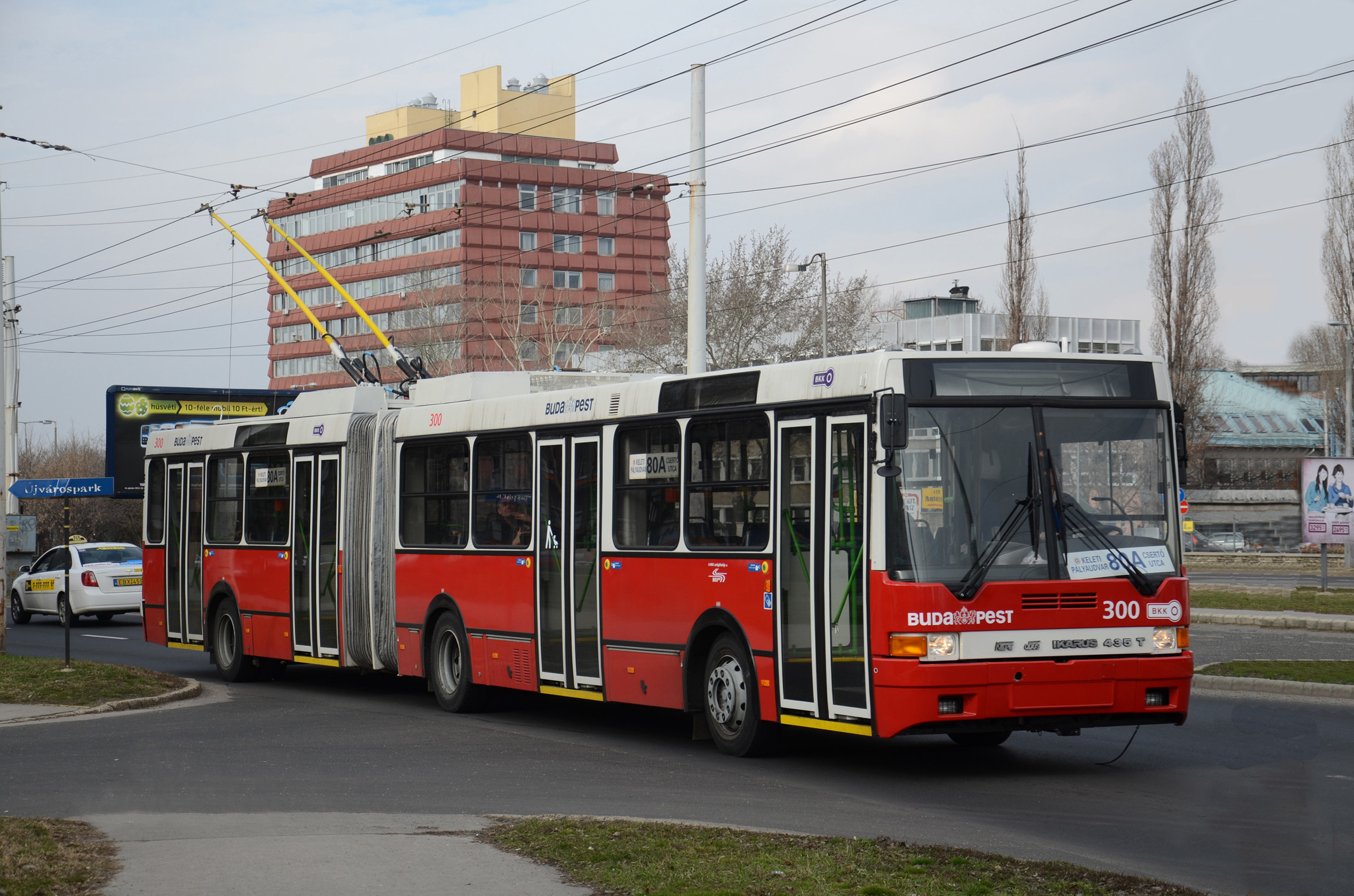 80A jelzésű Ikarus 435.81-es trolibusz a Csertő utcában